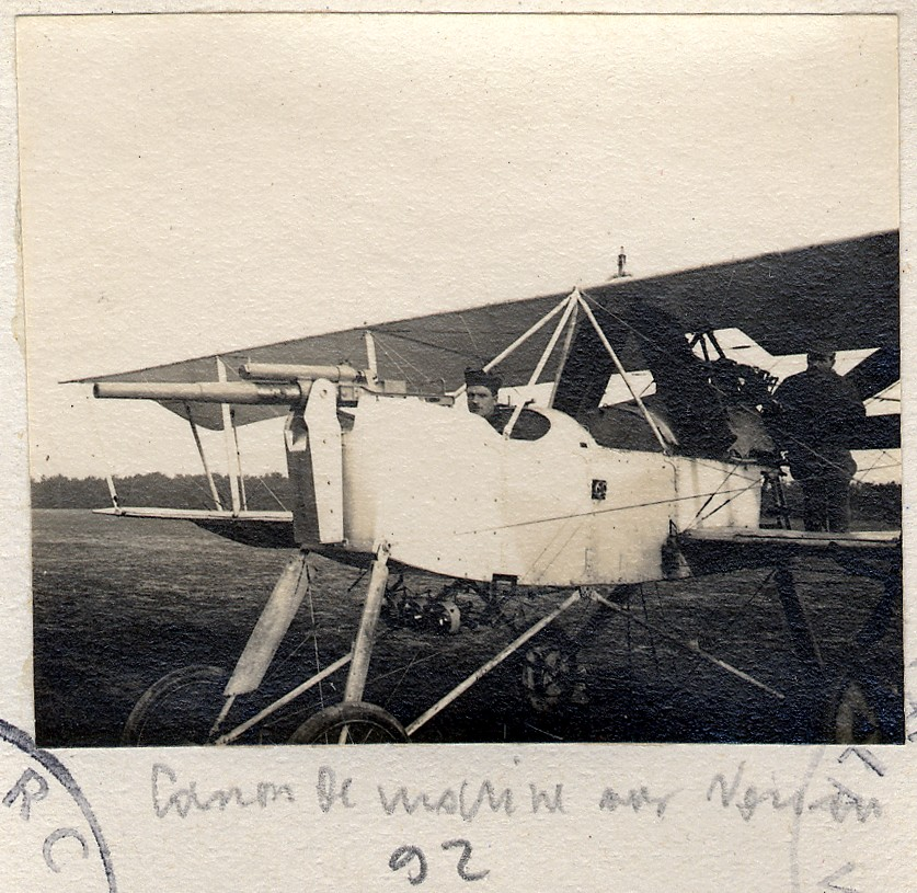 Avion Voisin de l'escadrille V.21 équipé d'un canon de marine à Saint-Etienne-au-Temple dans la Marne. 1916. Guerre 1914-1918.